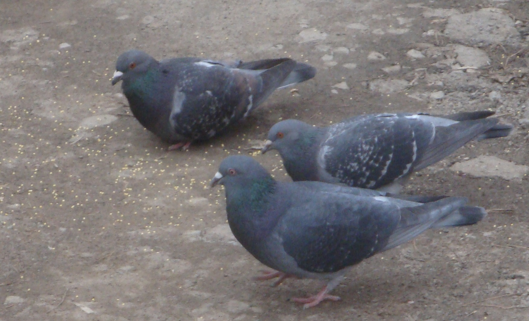 Сизые голуби в городе Трускавец питаются пшеном.